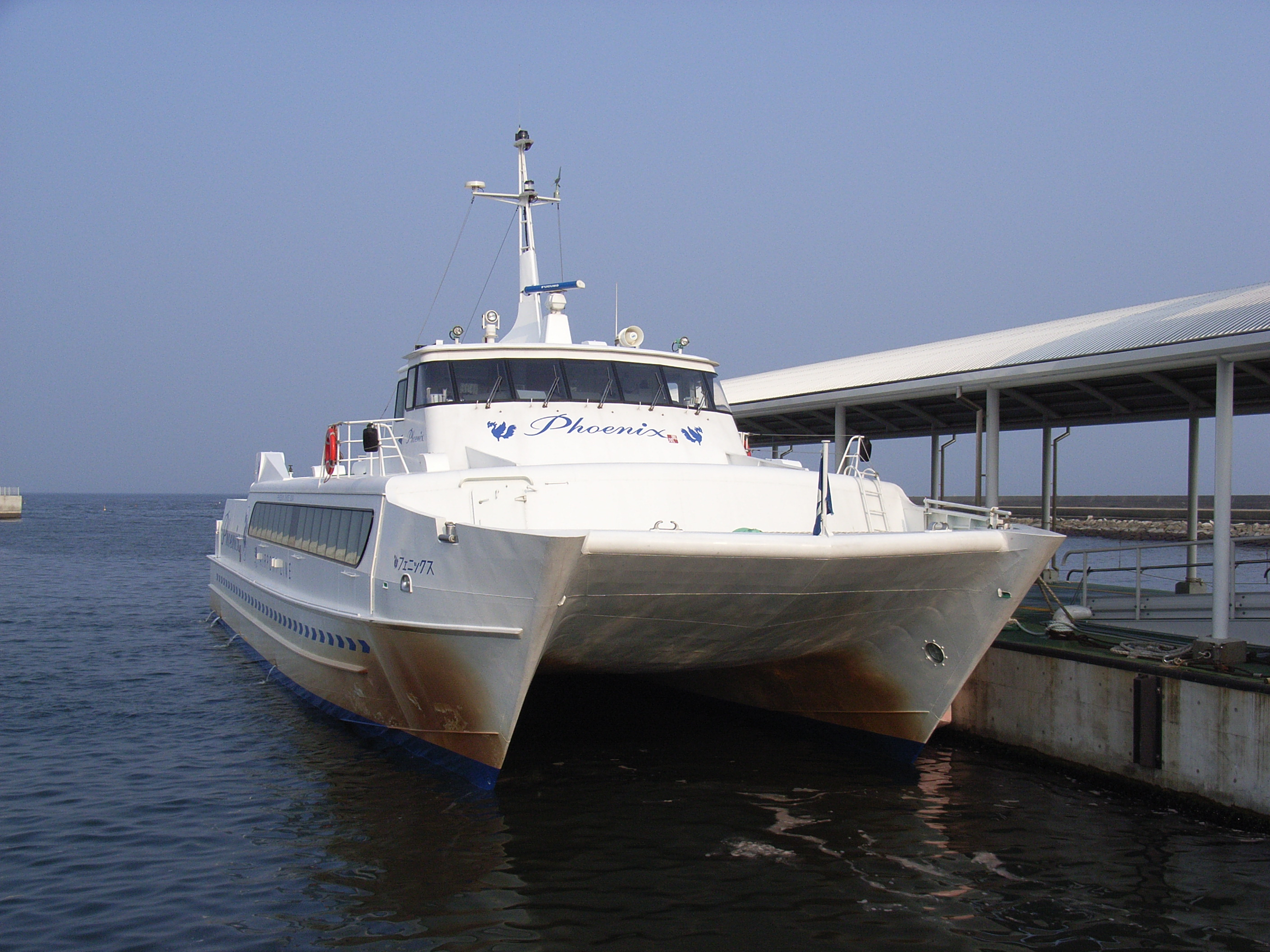 フェニックス（津エアポートライン） Name of ship : Phoenix IMO number: 8997089 Call Sign : JD2003